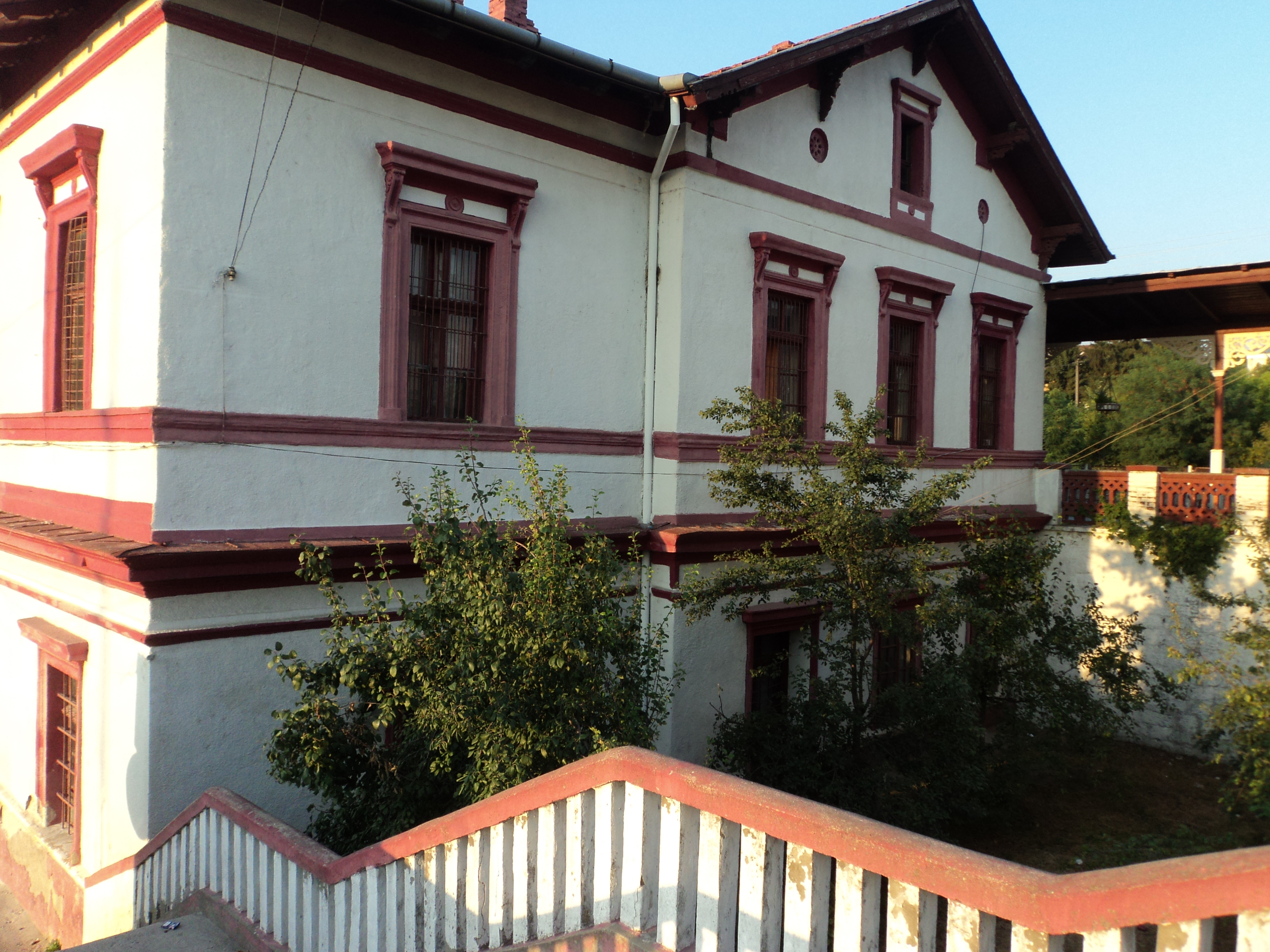 Gara Oraviţa